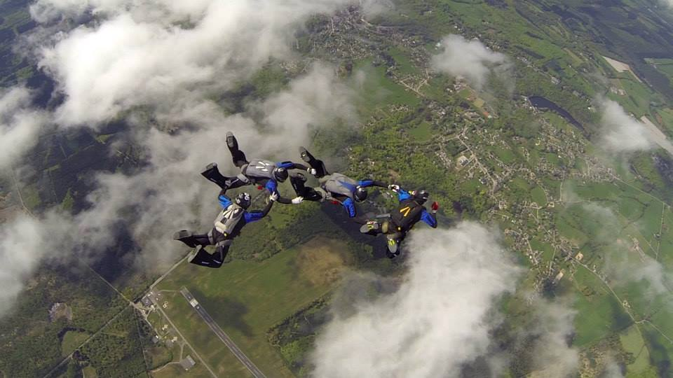 Vol relatif à 4